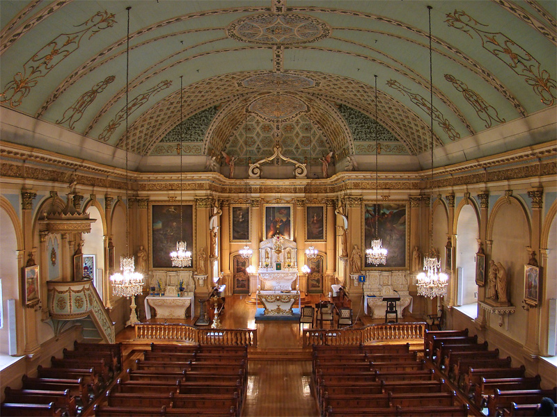 Église de la Visitation de la Bienheureuse-Vierge-Marie, Montréal, Québec, Canada.